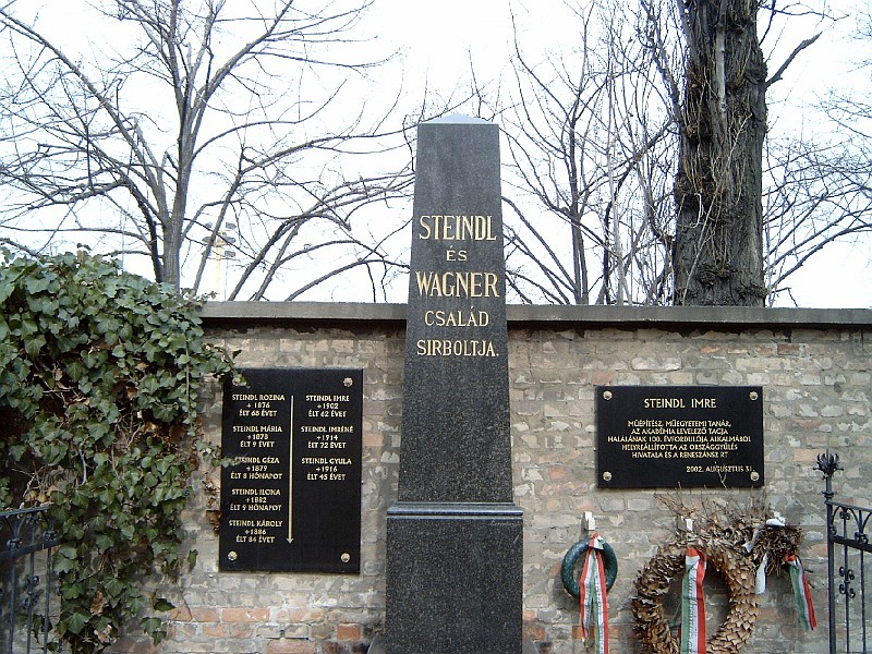 Steindl Imre (Pest, 1839. okt. 29. – Bp., 1902. aug. 31.): építész, műegyetemi tanát, az MTA l. tagjának sírja és a Steindl, továbbá a Wagner család sírboltja Budapesten. Kerepesi temető: B. 221.